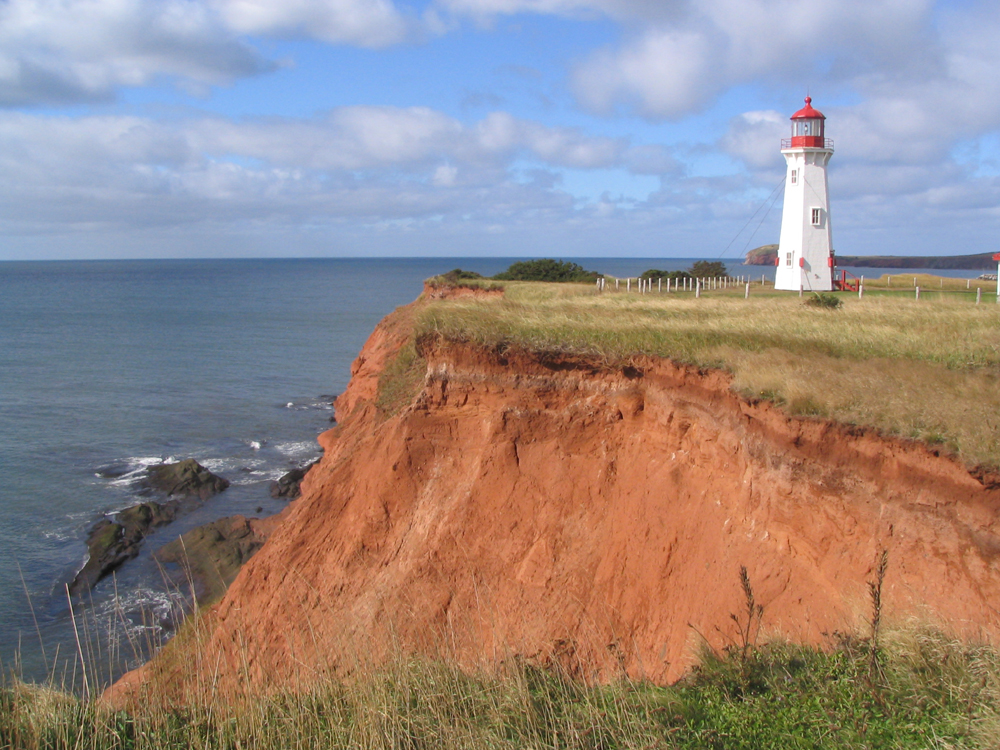 Phare de l'Anse-à-la-Cabane, Bassin, Îles-de-la-Madeleine